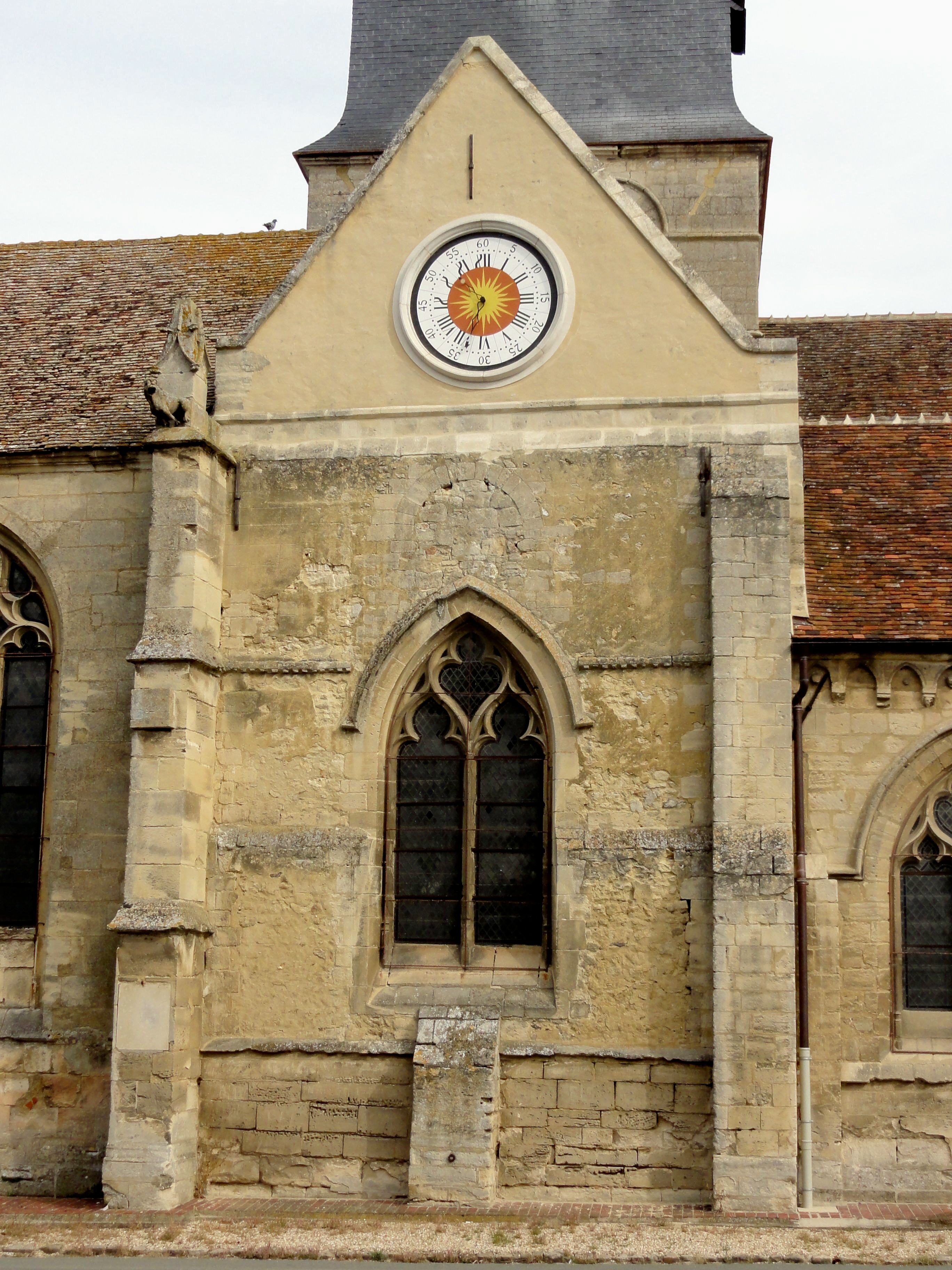 Croisillon sud.